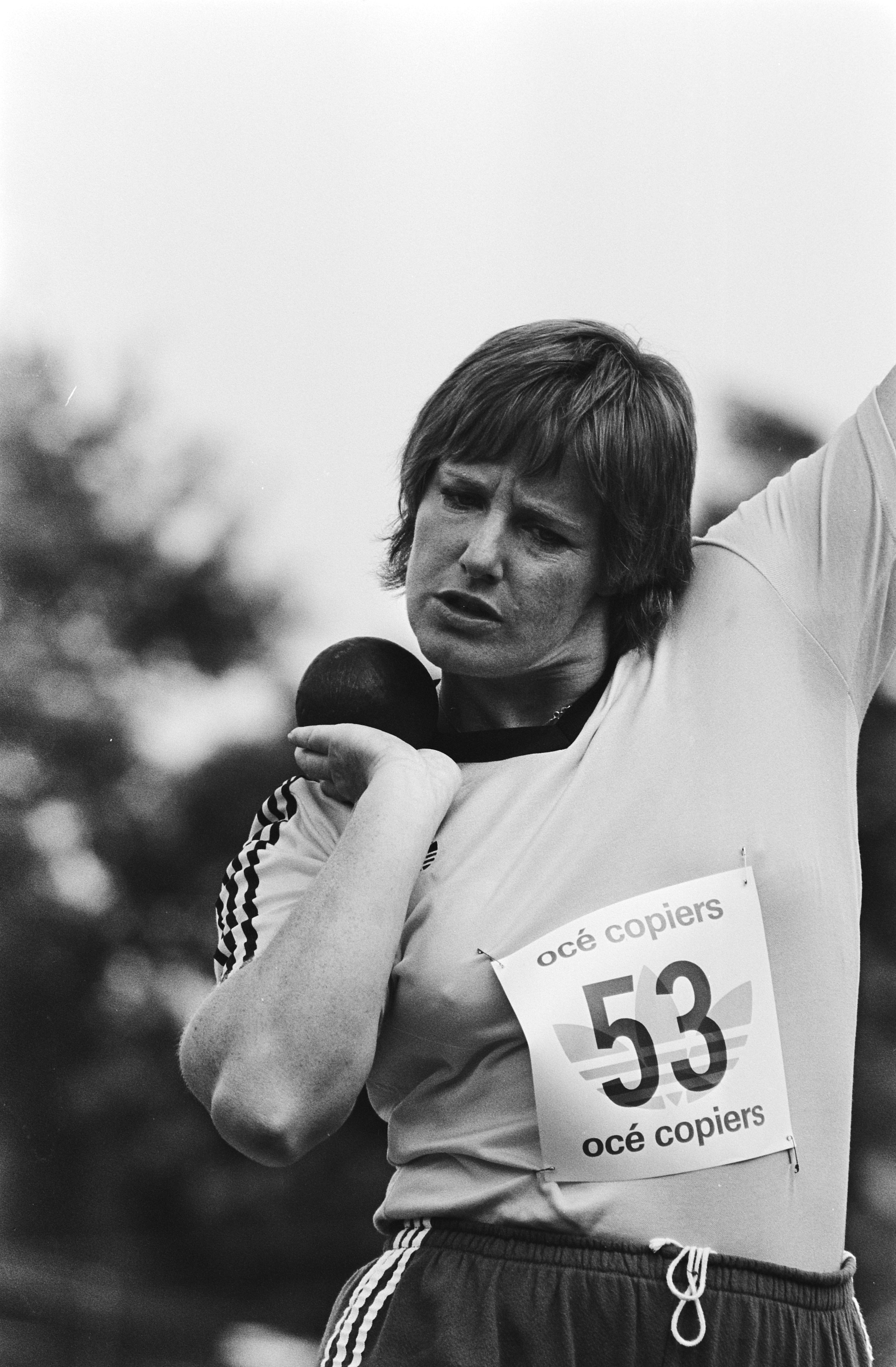 Collectie / Archief : Fotocollectie Anefo Reportage / Serie : Nederlandse Atletiekkampioenschappen te Vught Beschrijving : Ria Stalman tijdens het kogelstoten Datum : 23 juli 1983 Locatie : Noord-Brabant, Vught Trefwoorden : atletiek, kogelstoten, wedstrijden Persoonsnaam : Stalman, Ria Fotograaf : Bogaerts, Rob / Anefo Auteursrechthebbende : Nationaal Archief Materiaalsoort : Negatief (zwart/wit) Nummer archiefinventaris : bekijk toegang 2.24.01.05 Bestanddeelnummer : 932-6559